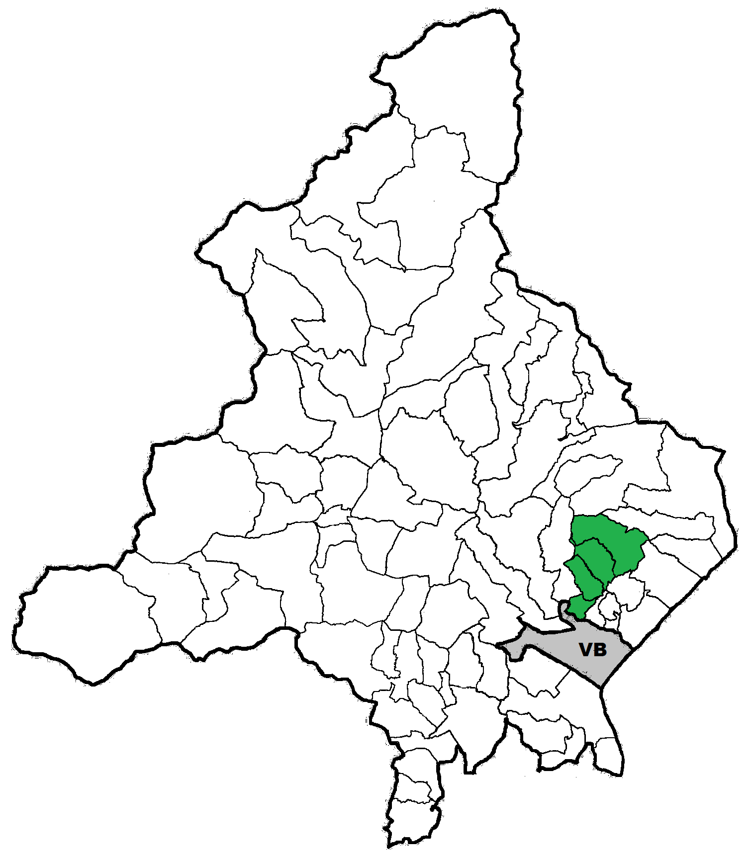 Posizione della Valle Intrasca nella provincia del Verbano Cusio Ossola (Verbania)